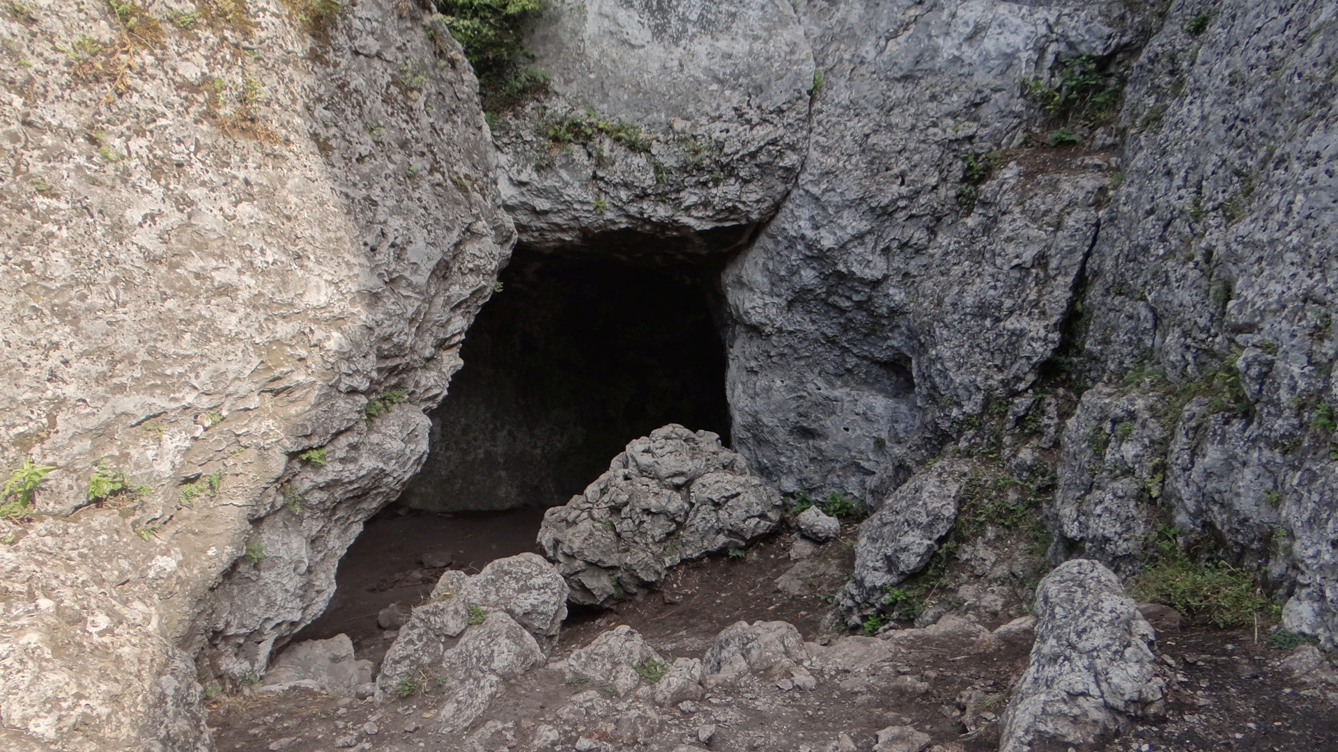 Schronisko Kazamar w Cyrku na Górze Zborów w Podlesicach